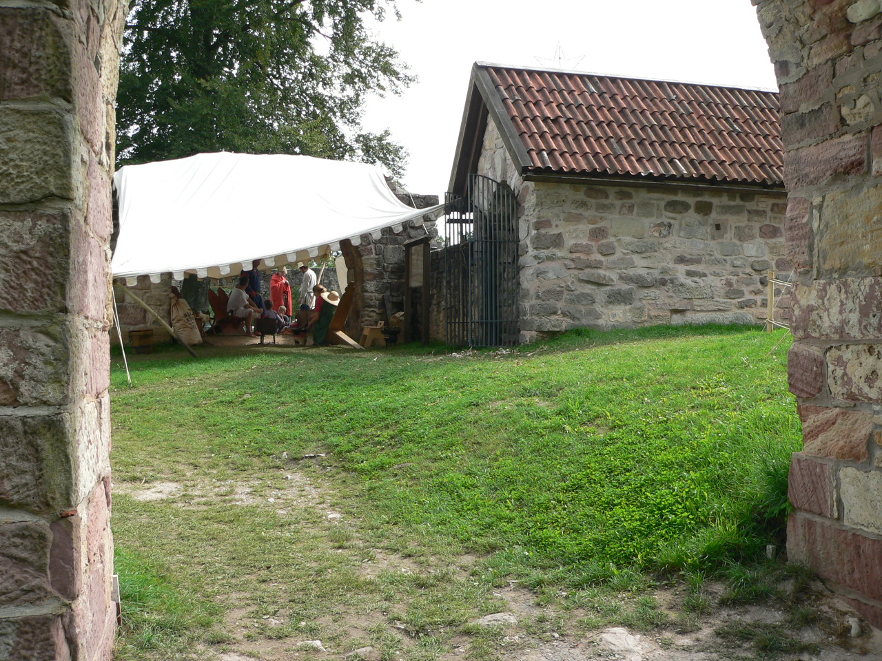 Lauterburg in Rödental-Oberwohlsbach